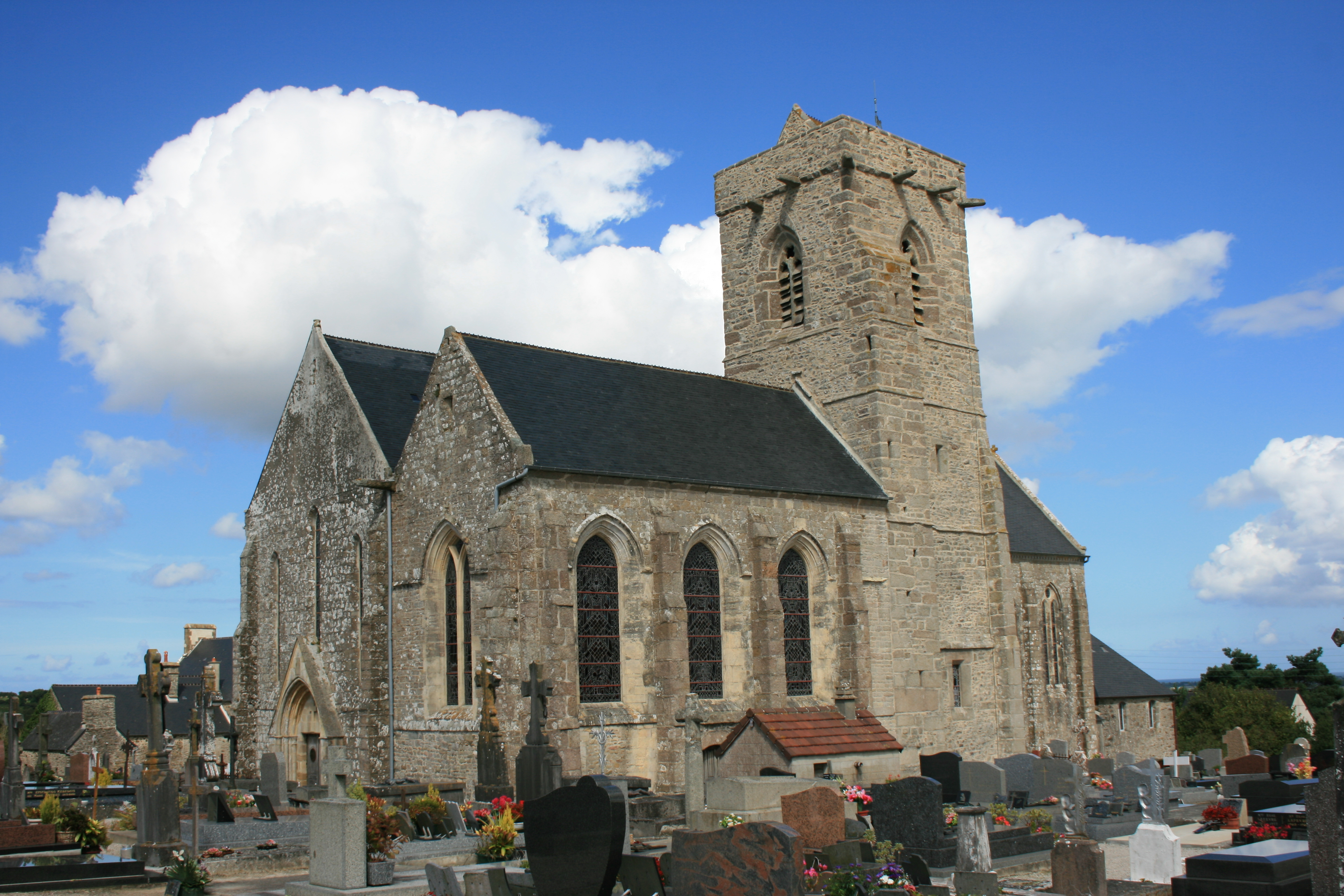 Eglise Saint-Vigor de Quettehou, exemple d'architecture normande